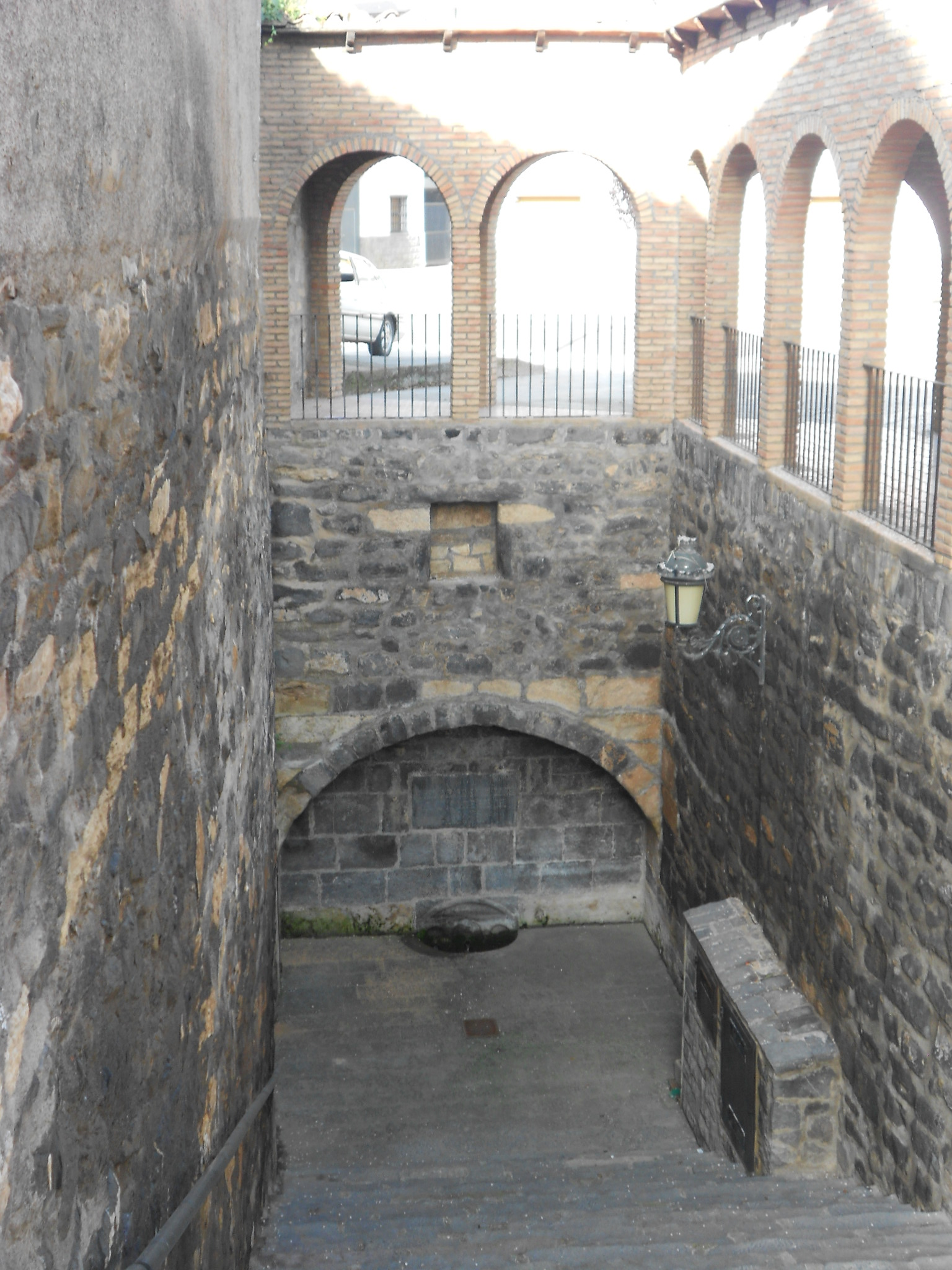 Fuente de las Escaleras (Calatorao, España)